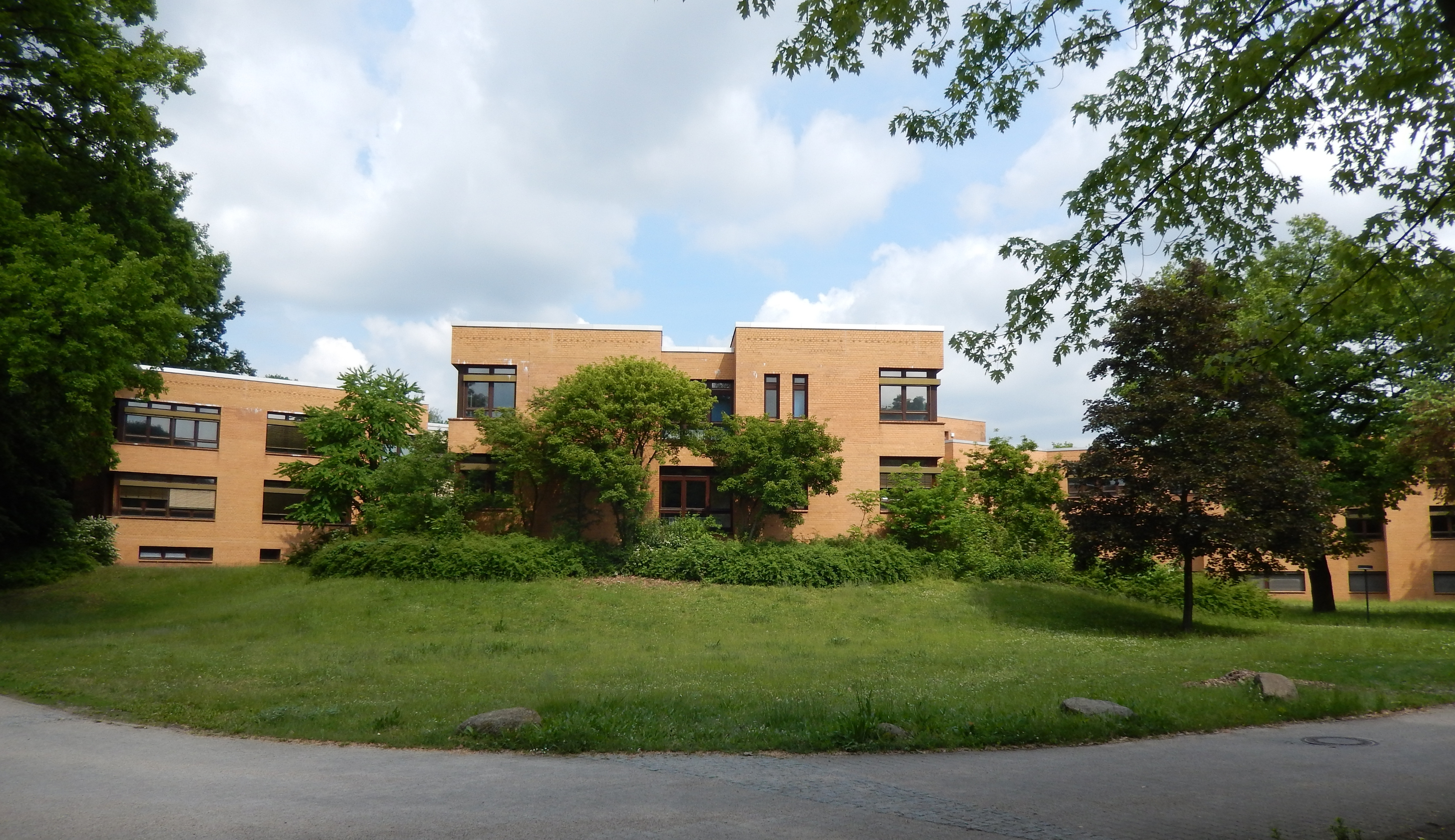 1982 eröffnetes Bettenhaus der Karl-Bonhoeffer-Nervenklinik, vormals Karl-Bonhoeffer-Heilstätten, Wittenauer Heilstätten bzw. Irrenanstalt Dalldorf, Architekt Gerd Hänska